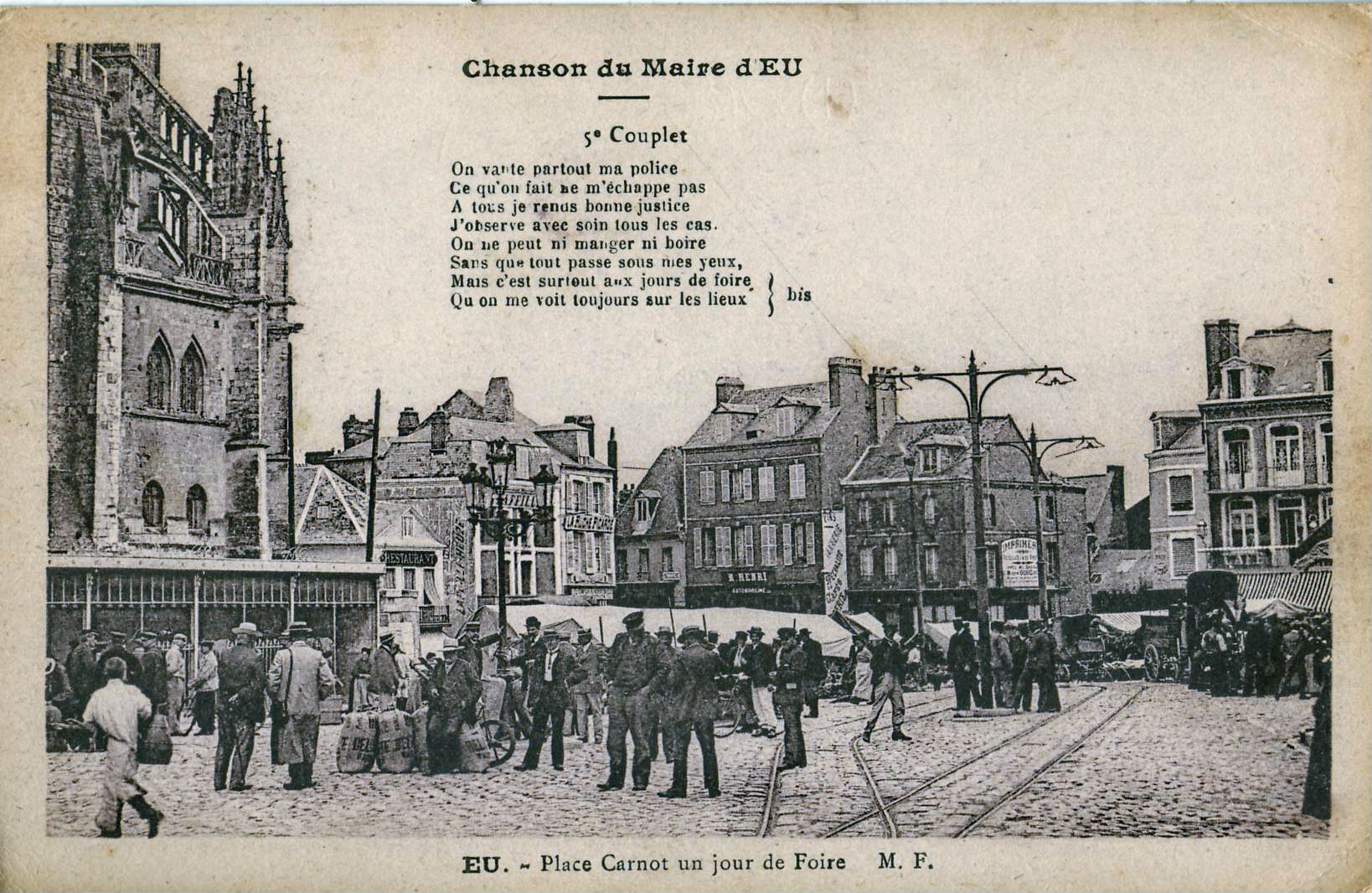 Carte postale ancienne éditée par M.F. : EU - Place Carnot un jour de Foire Vue de l'évitement de la Place Carnot du tramway d'Eu-Le Tréport-Mers